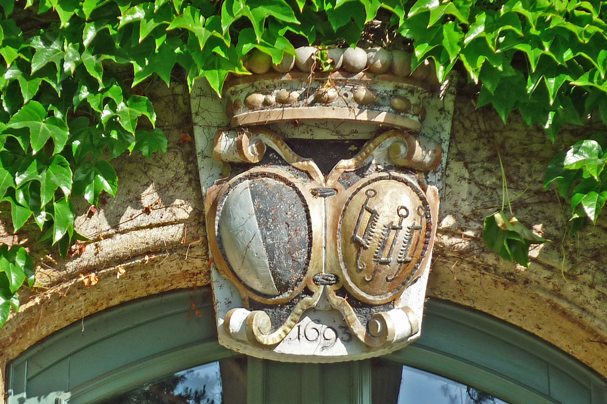 Wappen am Schloss Nickern in Dresden-Nickern, Allianzwappen Bose / Gustädt mit Jahreszahl 1693